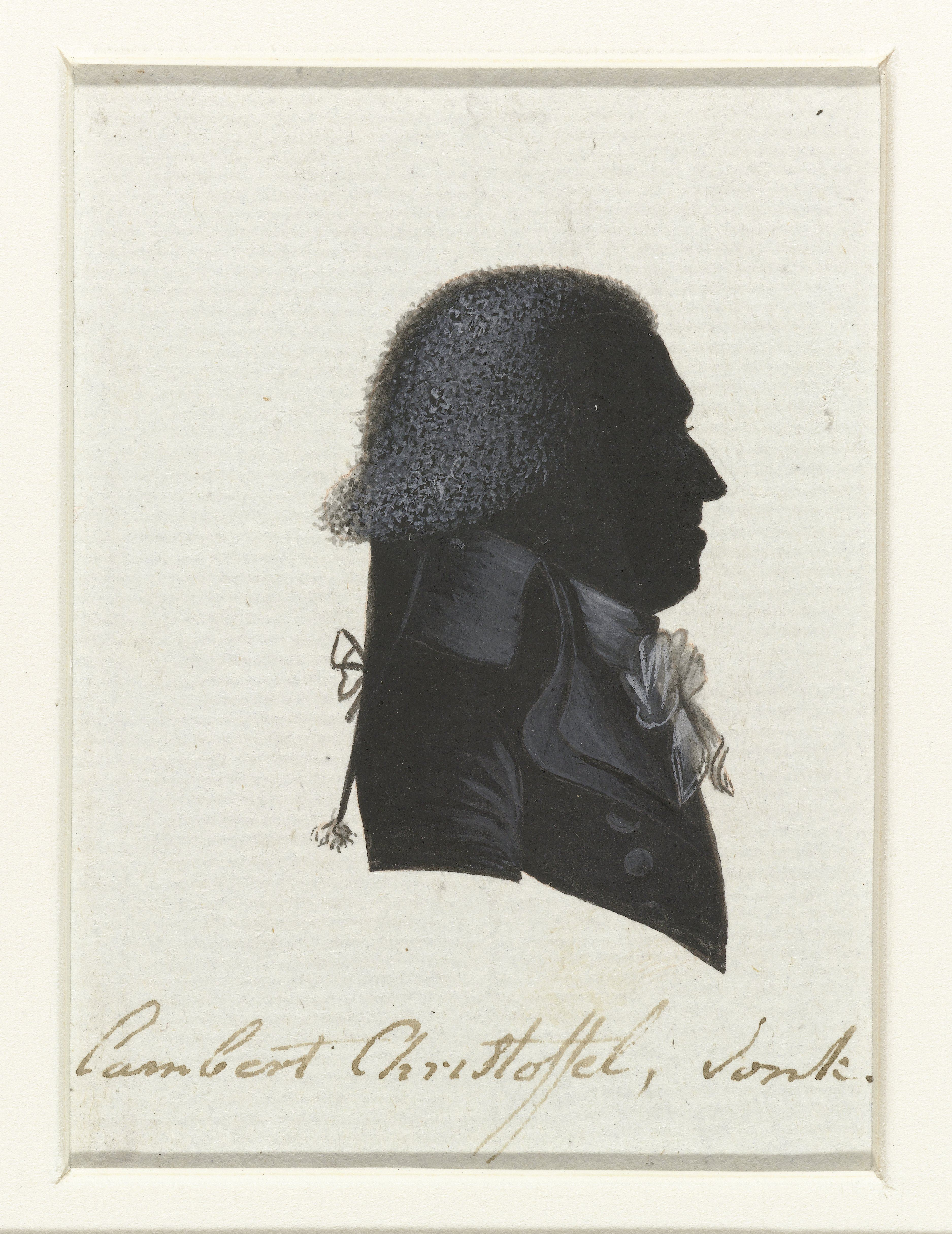 L.C. Vonk. Tekening in Oost-Indische inkt, waarschijnlijk gemaakt door Hausdorff. De tekening behoort tot een serie van portretten van afgevaardigden naar de Eerste Nationale Vergadering in 1796-1797. Van de serie werden gravures gemaakt die zijn afgedrukt in "Geschiedenis der staatsregeling, voor het Bataafsche volk", een boek van Cornelius Rogge (1799).